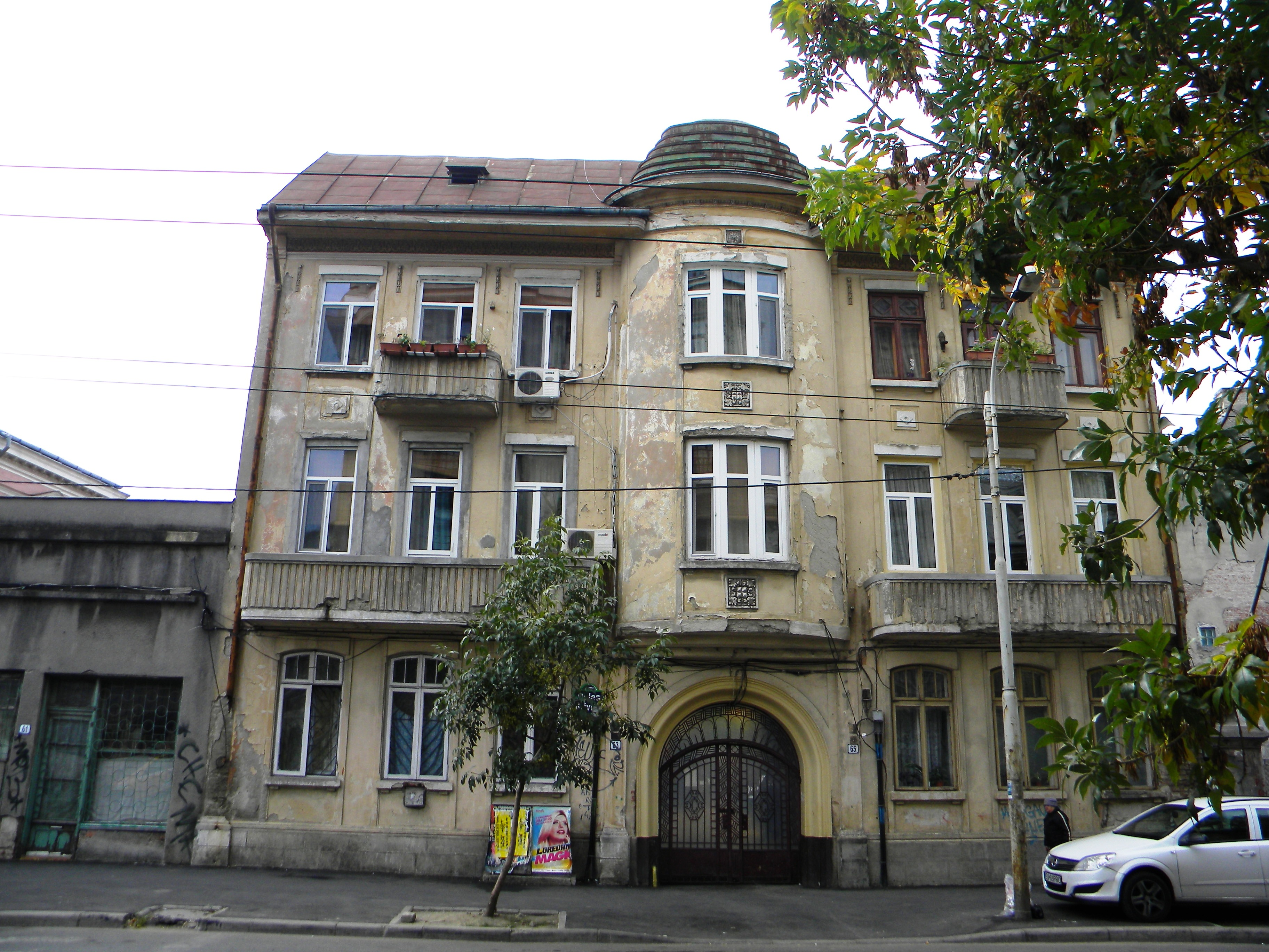 Bucuresti, Romania, Casa pe Calea Grivitei nr. 63-65, sect. 1